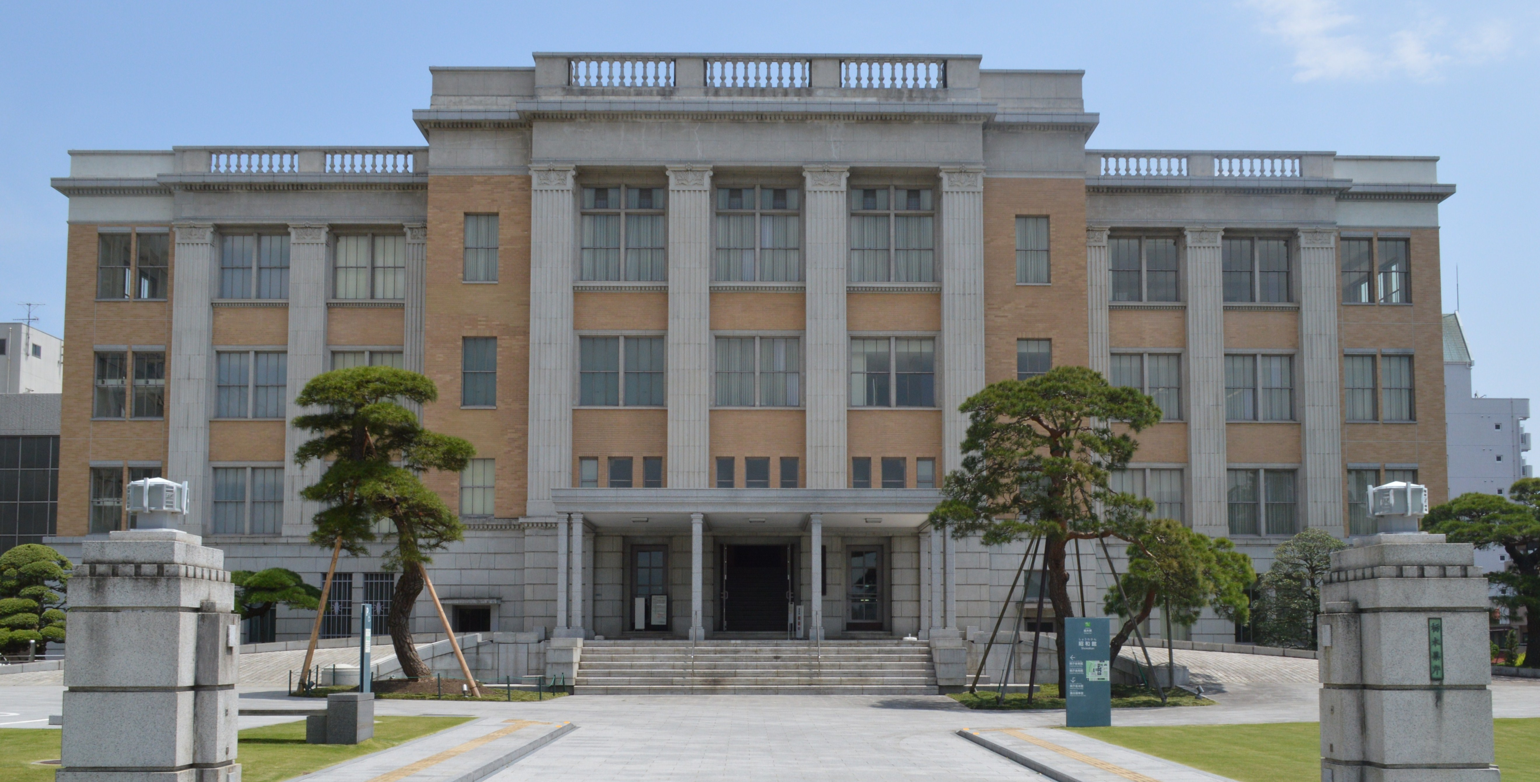 栃木県宇都宮市 栃木県庁舎 昭和館